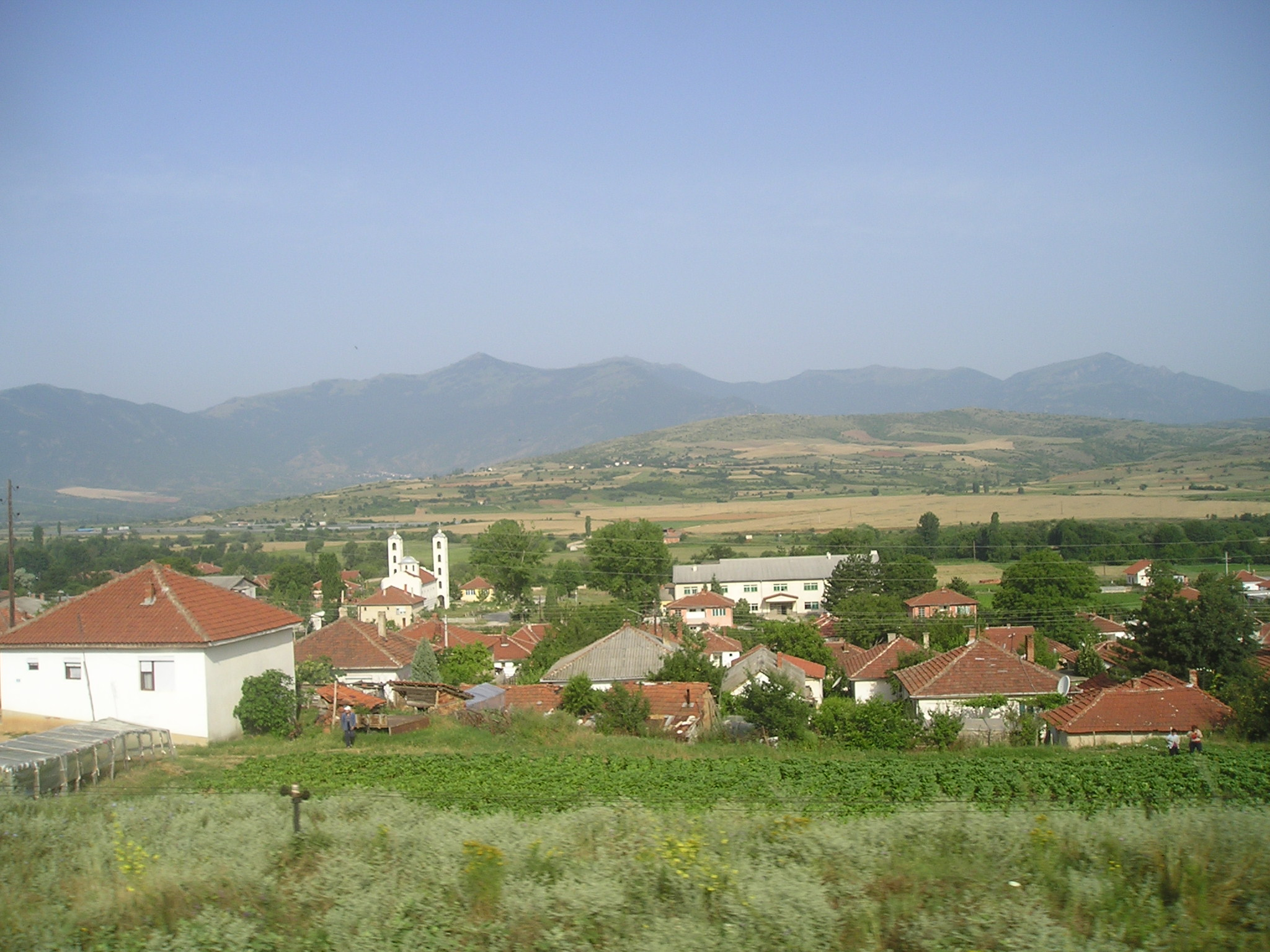 Село Чашка, Република Македония Čaška village near Veles, R.o.Macedonia Wieś Čaška koło Velesu, Macedonia Село Чашка во околината на градот Велес, Македонија